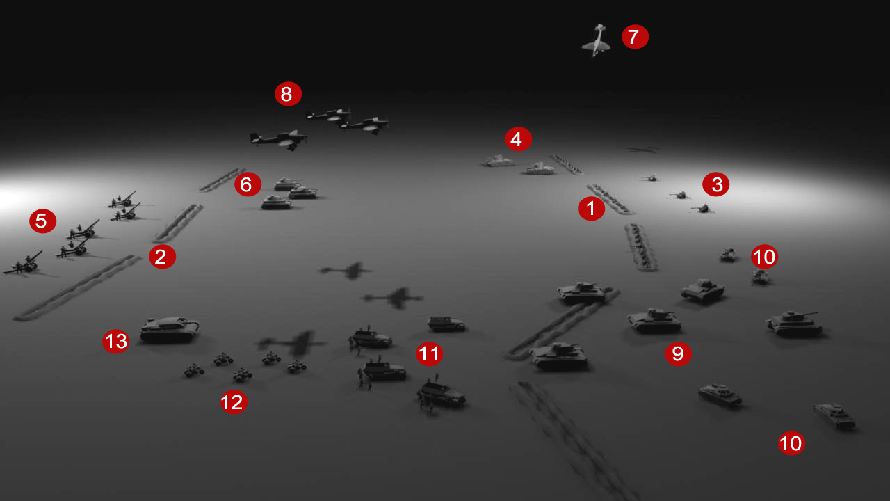 Приказ немачке тактике муњевитог рата. Приказан је принцип комбинованог дејства трупа Вермахта у нападу. Објашњење: Положаји браниоца Положаји нападача Артиљерија браниоца Тенкови браниоца Артиљерија нападача: дејствује навођењем из ваздуха или директним са земље. За разлику од Првог светског рата ватра је концентрисана на знатно ужи простор Средњи и тешки тенкови нападача: циљ је дејство по противничким ватреним тачкама, утврђењима и оклопним возилима По дејству артиљерије и тенкова положаје браниоца нападају Штуке. Њихов задатак је уништавање ПТ оруђа, утврђених тенкова и бункера те паралисање позадине браниоца Осим блиске подршке нападу ескадриле бомардера за обрушавање директно прате напредовање и дејствују по позадини браниоца Главни тенковски напад: панцер шок, тактика при којој се групишу тенкови и нападају на релативно узаном делу фронта Аутоматски по пробоју непријатељских линија од трупа које су направиле пробој један део напада непосредну позадину противника у намери опкољавања и уништавања истог Пешадија напада као пратња тенкова. Користе се и оклопни транспортери (јединице панцергренадира, претеча модерне моторизоване пешадије) Мотоциклистичке јединице се крећу иза трупа у пробоју а по пробоју фронта продужавају даље у позадину противника са циљем осигуравања комуникација и даљег навођења трупа у нападу Новитет блицкрига јесу и јуришни топови, односно возила за директну блиску подршку пешадије (као што је Штуг)